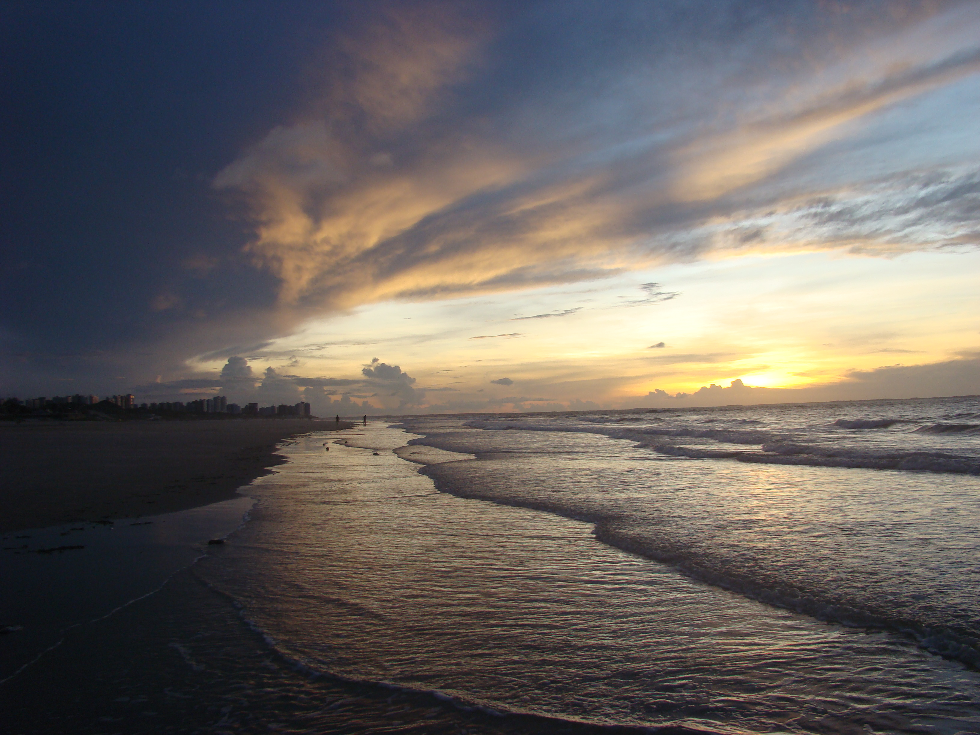 Por do Sol 4 na Praia do Calhau, São Luis, Maranhão